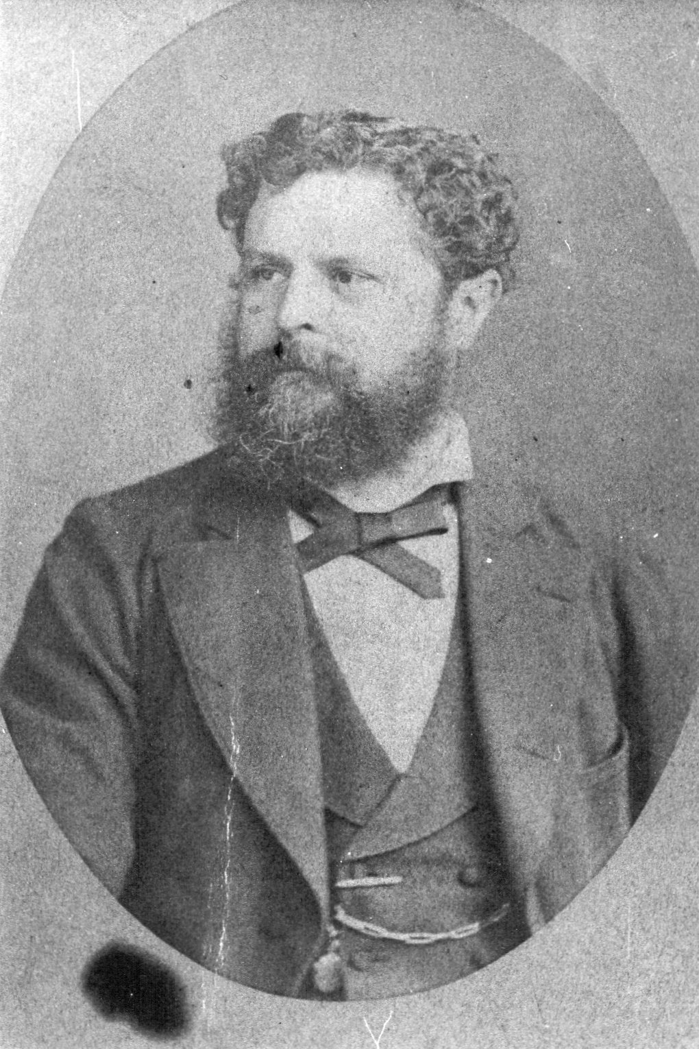 photographie universelle d'Alphée Dubois Paris